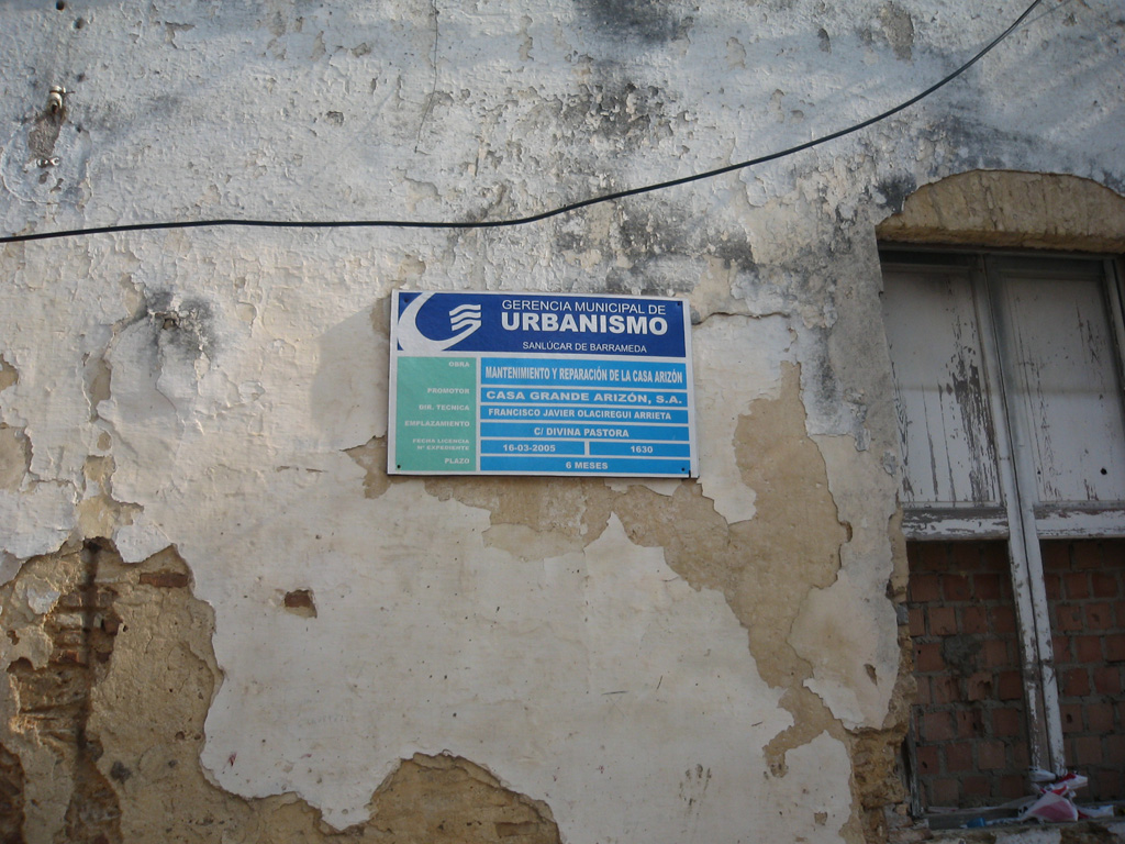 Cartel de obras en la Casa de Arizón de Sanlúcar de Barrameda